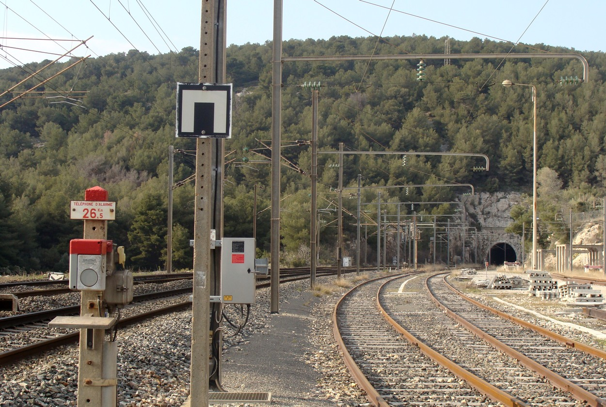 Gare de Cassis (Bouches-du-Rhône). A droite les voies de desserte de l'embranchement particulier (carrières Lafarge) ; au fond, l'entrée sud du tunnel du Mussuguet.